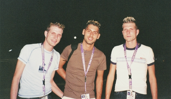 Deitsch: Brain Access im Jahr 2001.